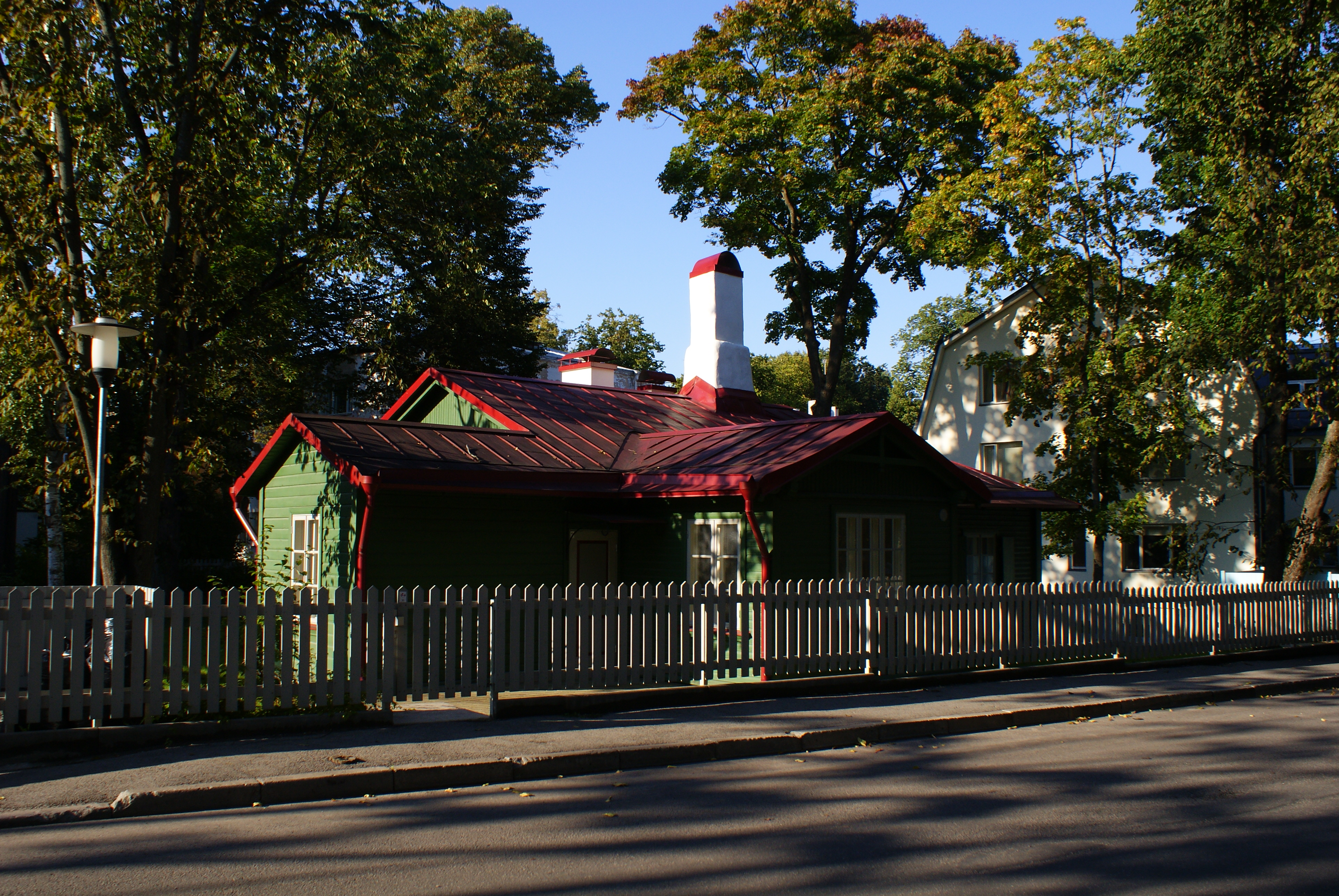 Poska 19, Tallinn